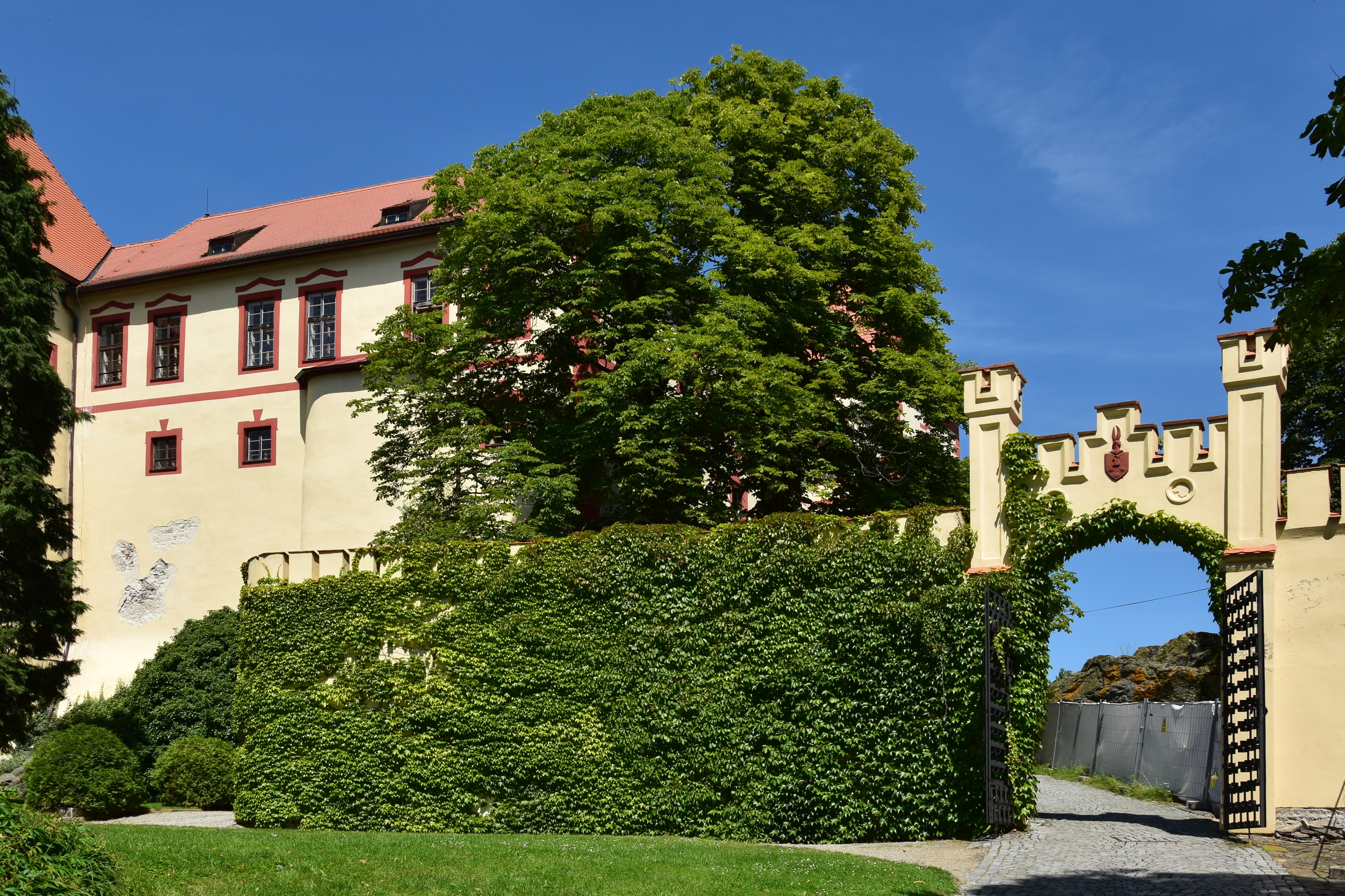 Hrad Kámen – vjezd do druhého nádvoří